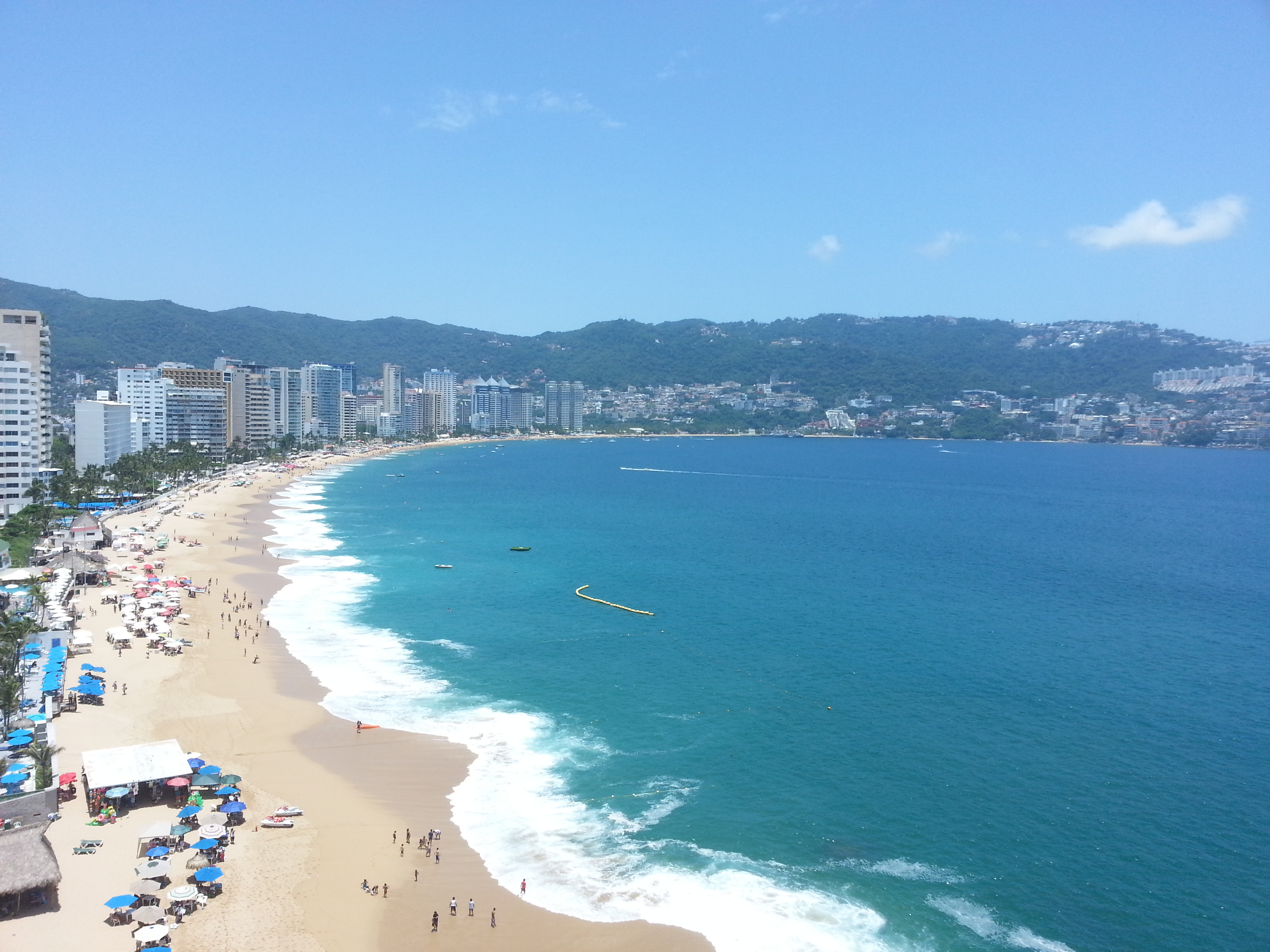 acapulco